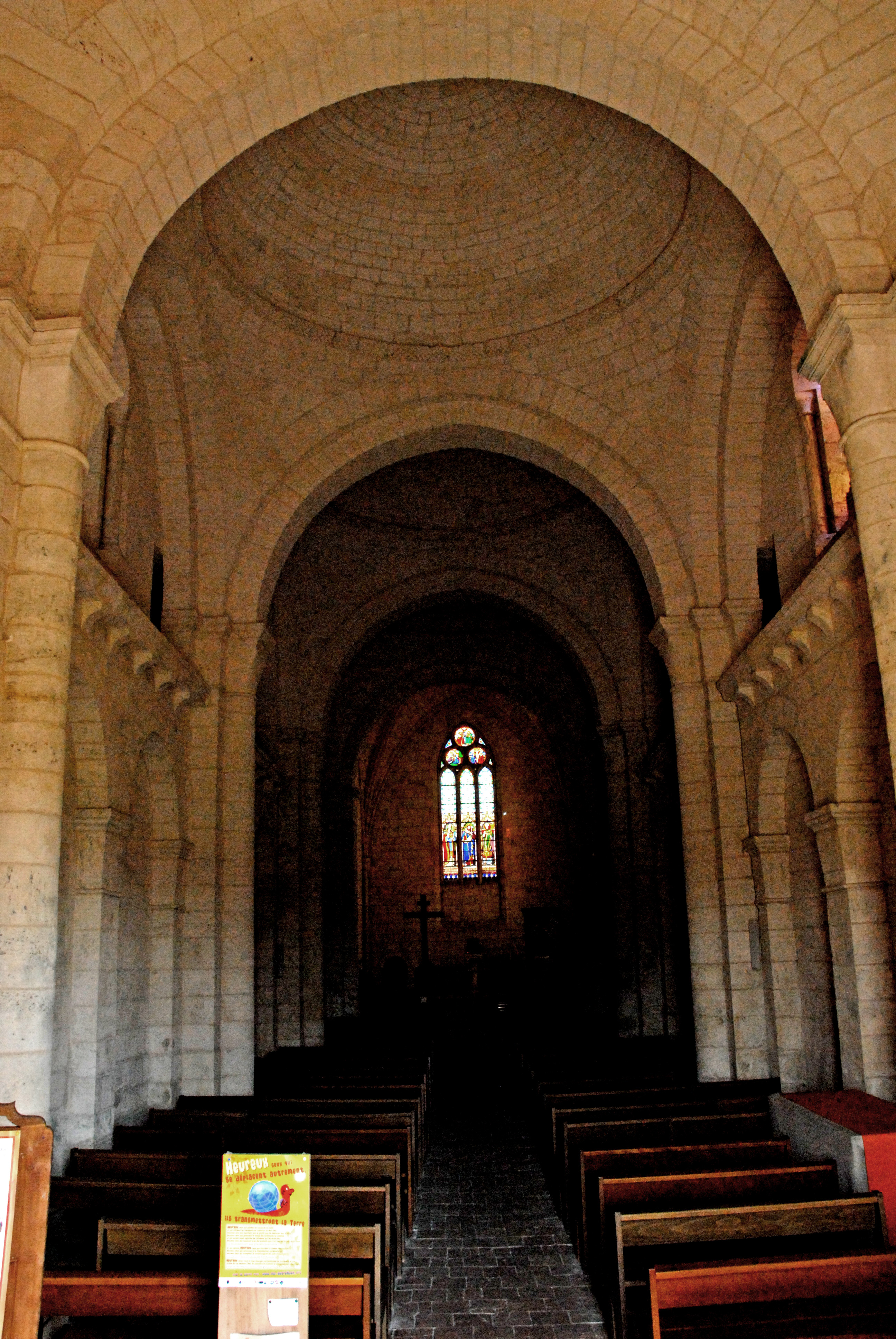 Genzac-la-Pallue, Schiff, aus 1. Joch zum Chor